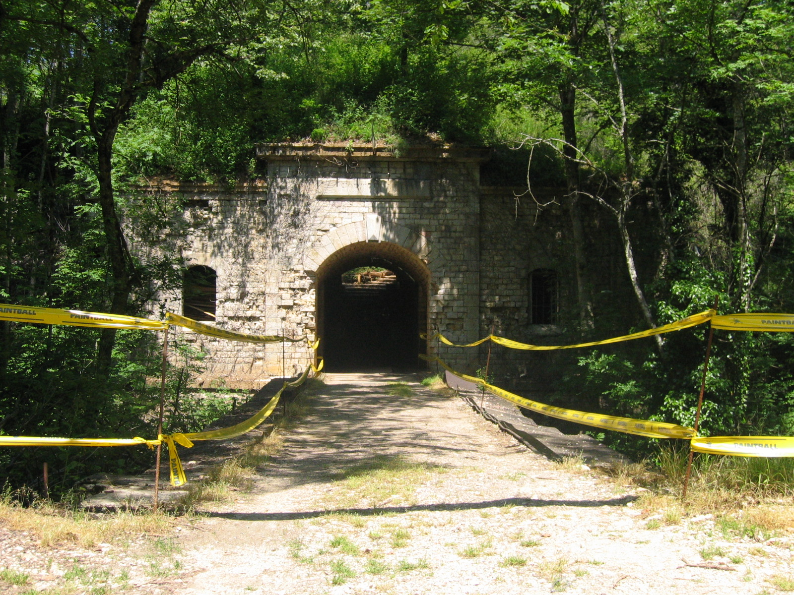 pont fort. This picture is of Fort Brule in the French commune of Asnières-lès-Dijon.